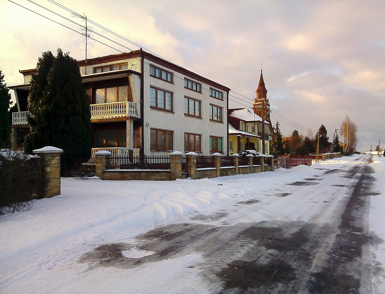 Radomsko, Poland